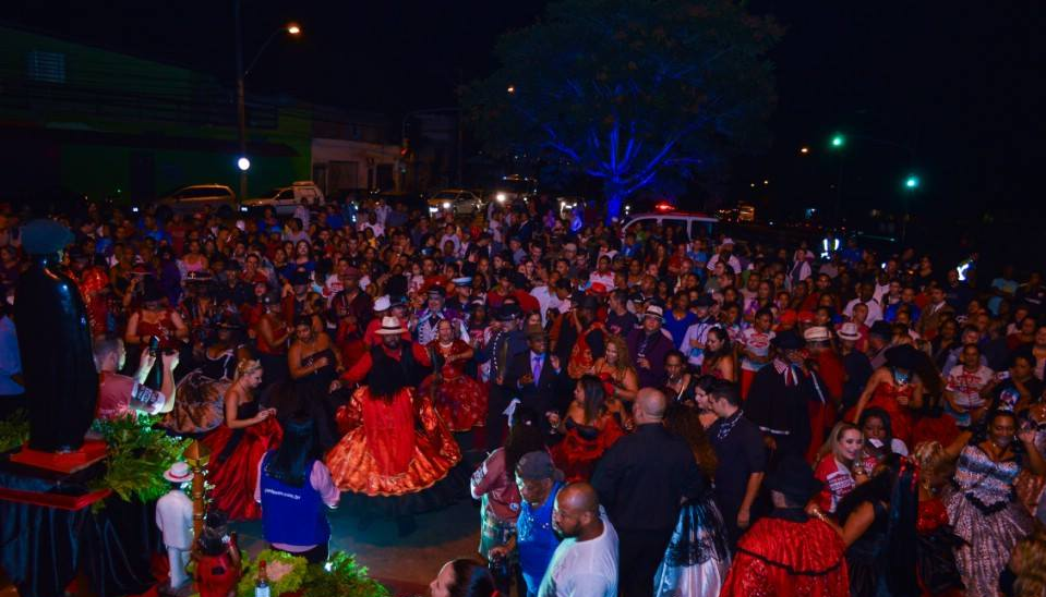 Gran encuentro de Quimbanda en Brasil